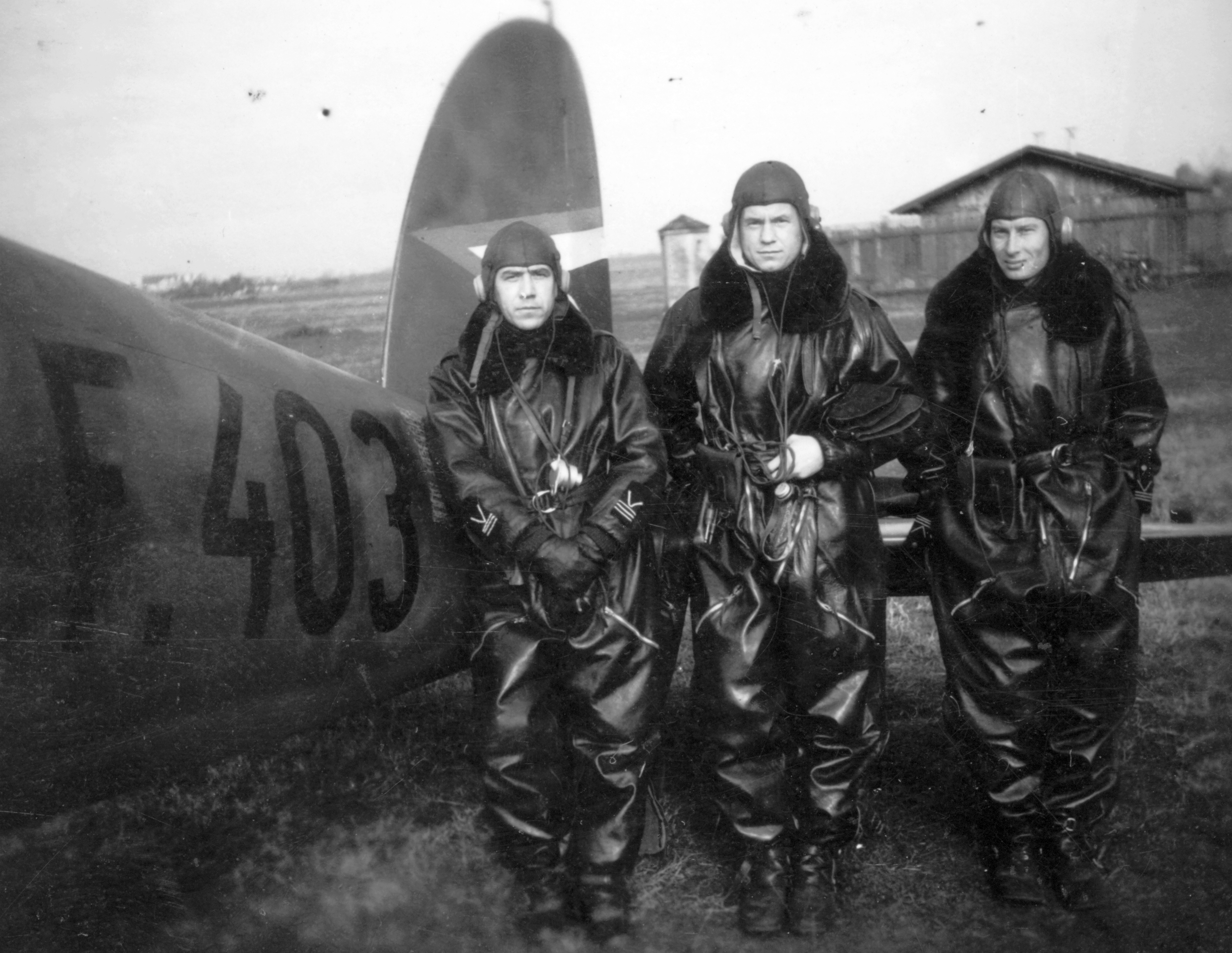 Heinkel He-70K típusú távolfelderítő repülőgép. Tags: Royal Hungarian Air Force, airport, transport, military, pilot, Gerrman brand, Heinkel-brand Title: Heinkel He-70K típusú távolfelderítő repülőgép.